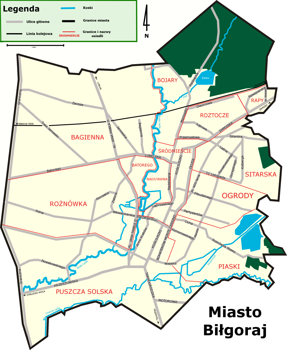 Plan głównych ulic Biłgoraja po drobnych poprawkach, na podstawie pracy R.P.